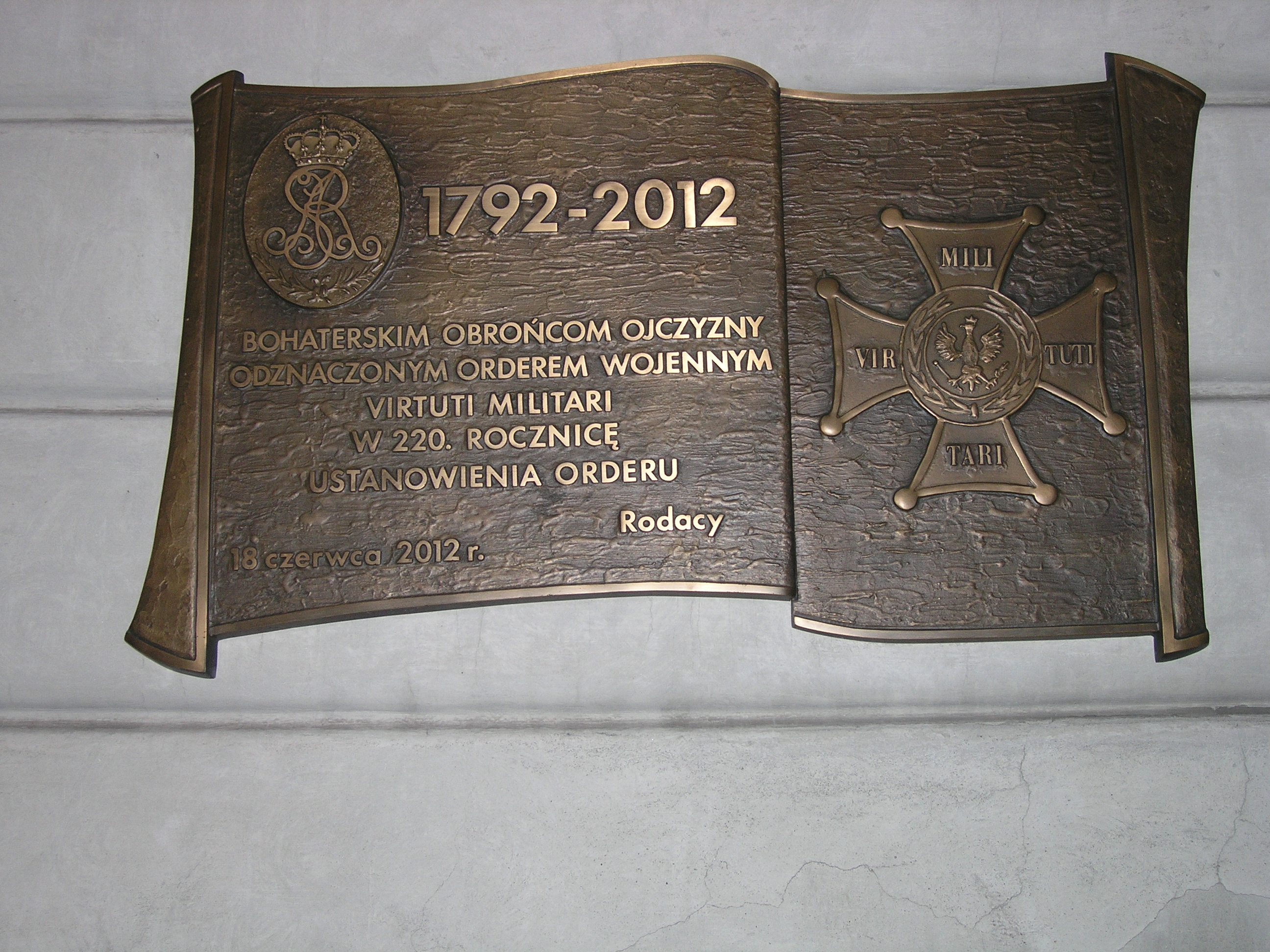 Tablica upamiętniająca kawalerów Orderu Virtuti Militari na pl. Marszałka Józefa Piłsudskiego w Warszawie